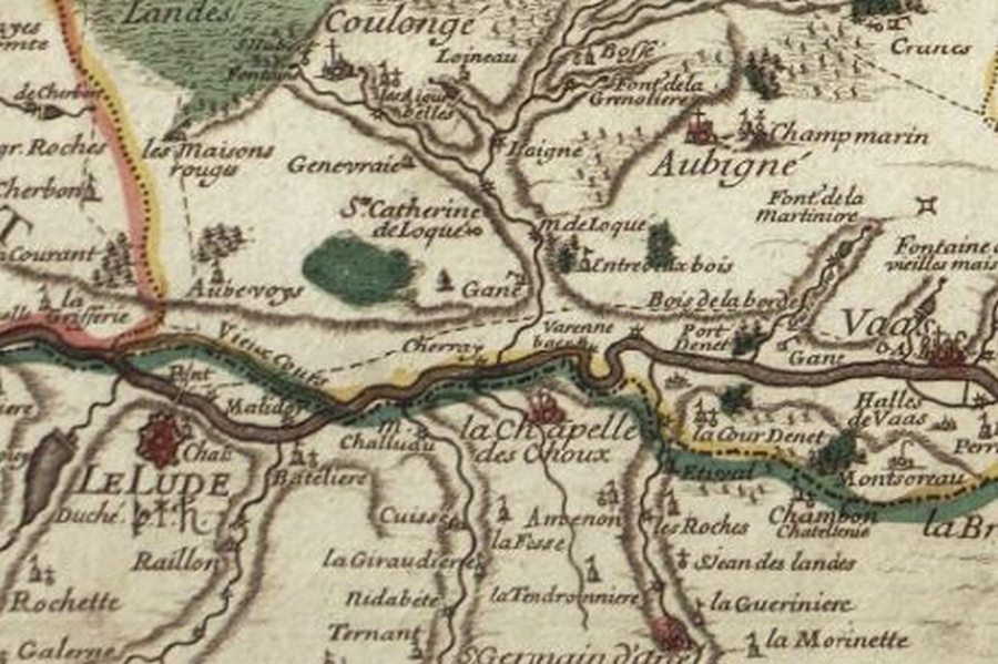 Extrait de la carte de l'évêché du Mans mentionnant Cherré (Cherray) et [le château de] Gane.